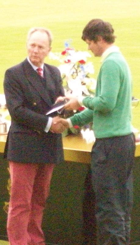 Alan Dunbar (rechts), Zweitplatzierter der St Andrews Links Trophy 2012 bei der dortigen Siegerehrung